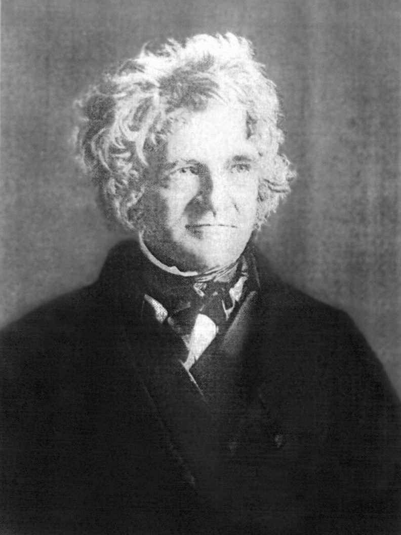 Friedrich Wilhelm Bessel 1843 (Daguerotypie)Quelle: Friedrich Wilhelm Bessel: Ich habe Euch lieb aber der Himmel ist mir näher. Minden 1984